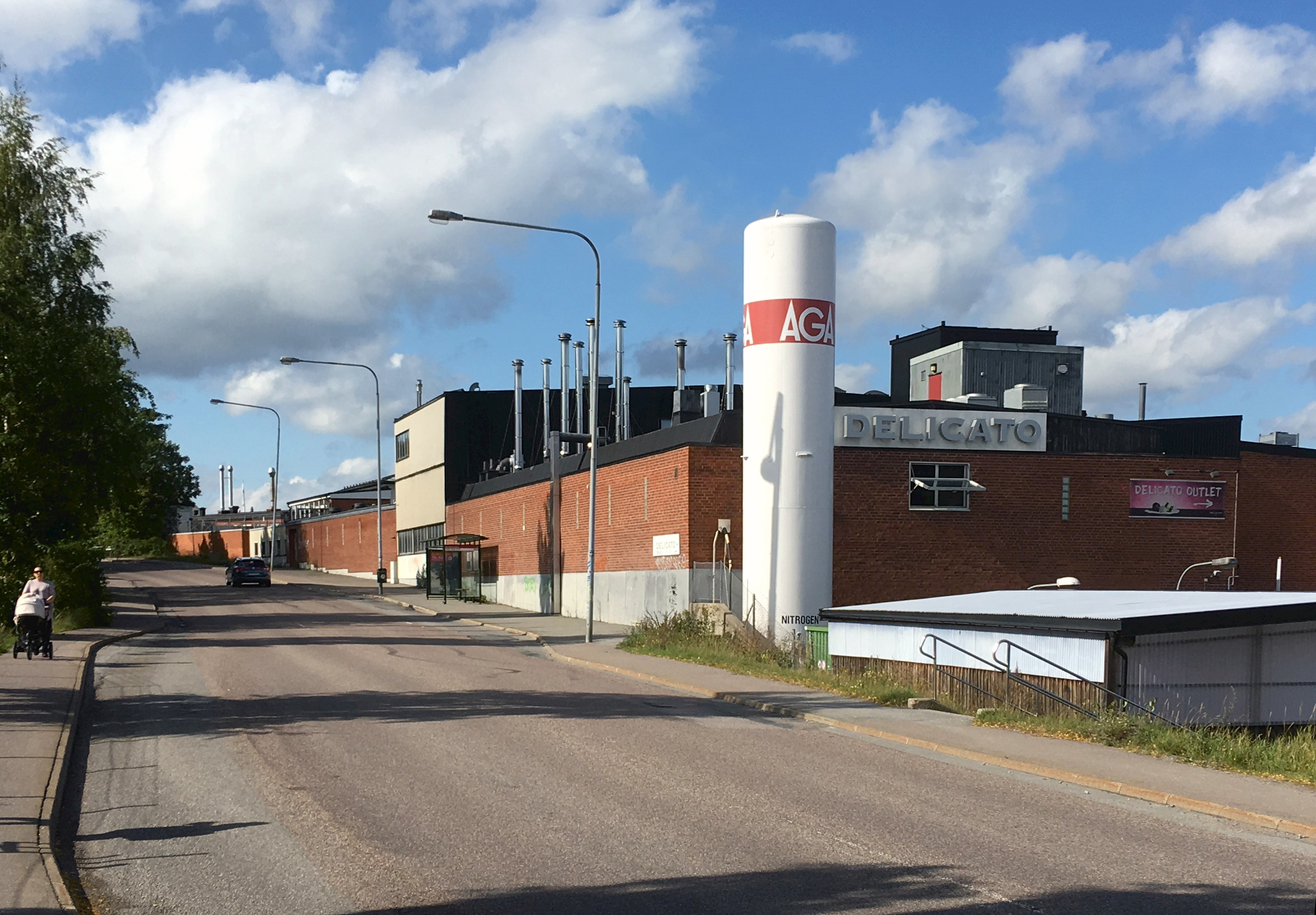 Gamla Södertäljevägen 118-120 (Delicatos fabrik)